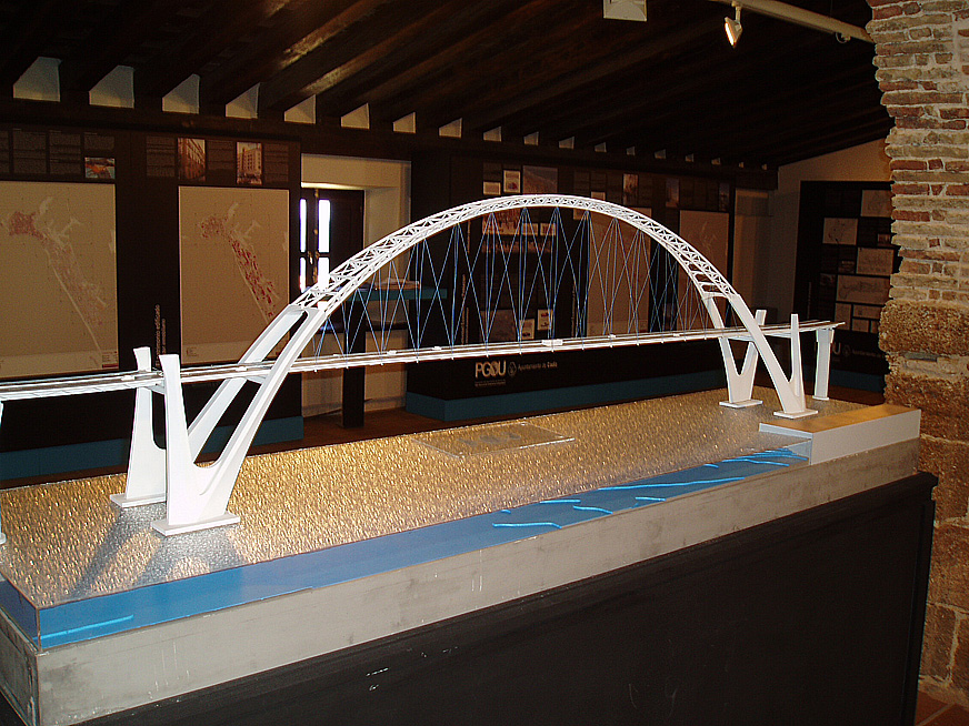 Maqueta del puente de la Constitución de 1812 de Cádiz, España.